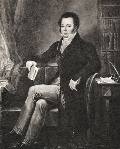 Hans Wachtmeister (1793-1827)